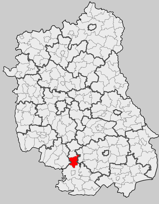 Map of gmina Frampol, Biłgoraj county, Lublin voivodship Mapa gminy Frampol, powiat biłgorajski, województwo lubelskie